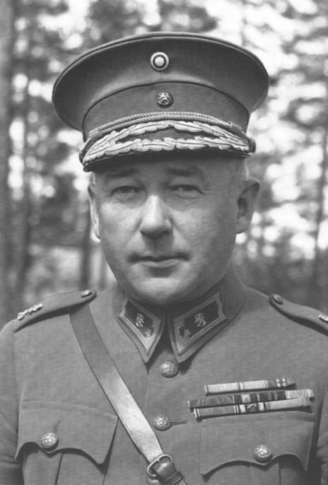 Description